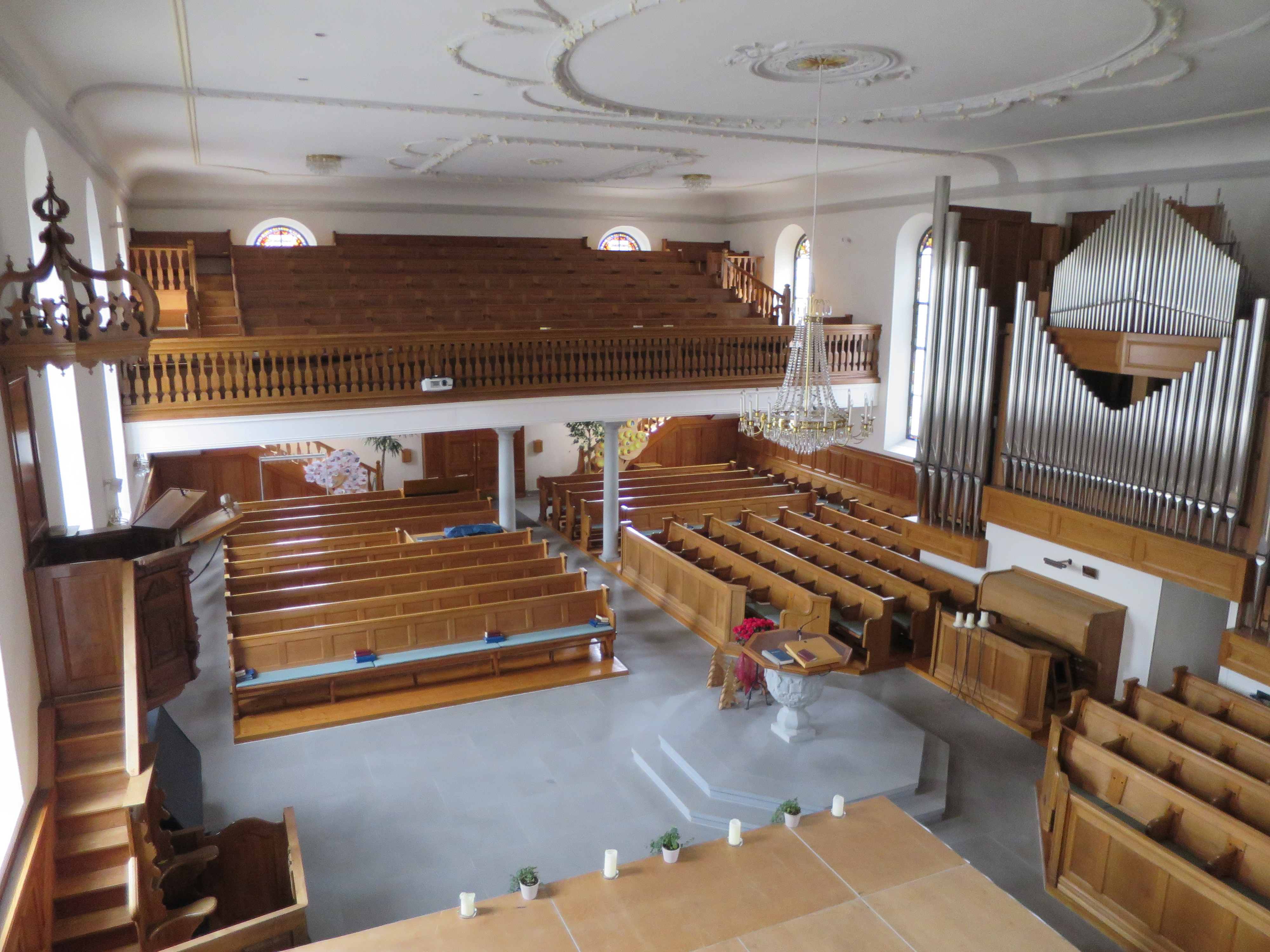 Reformierte Kirche Bauma innen